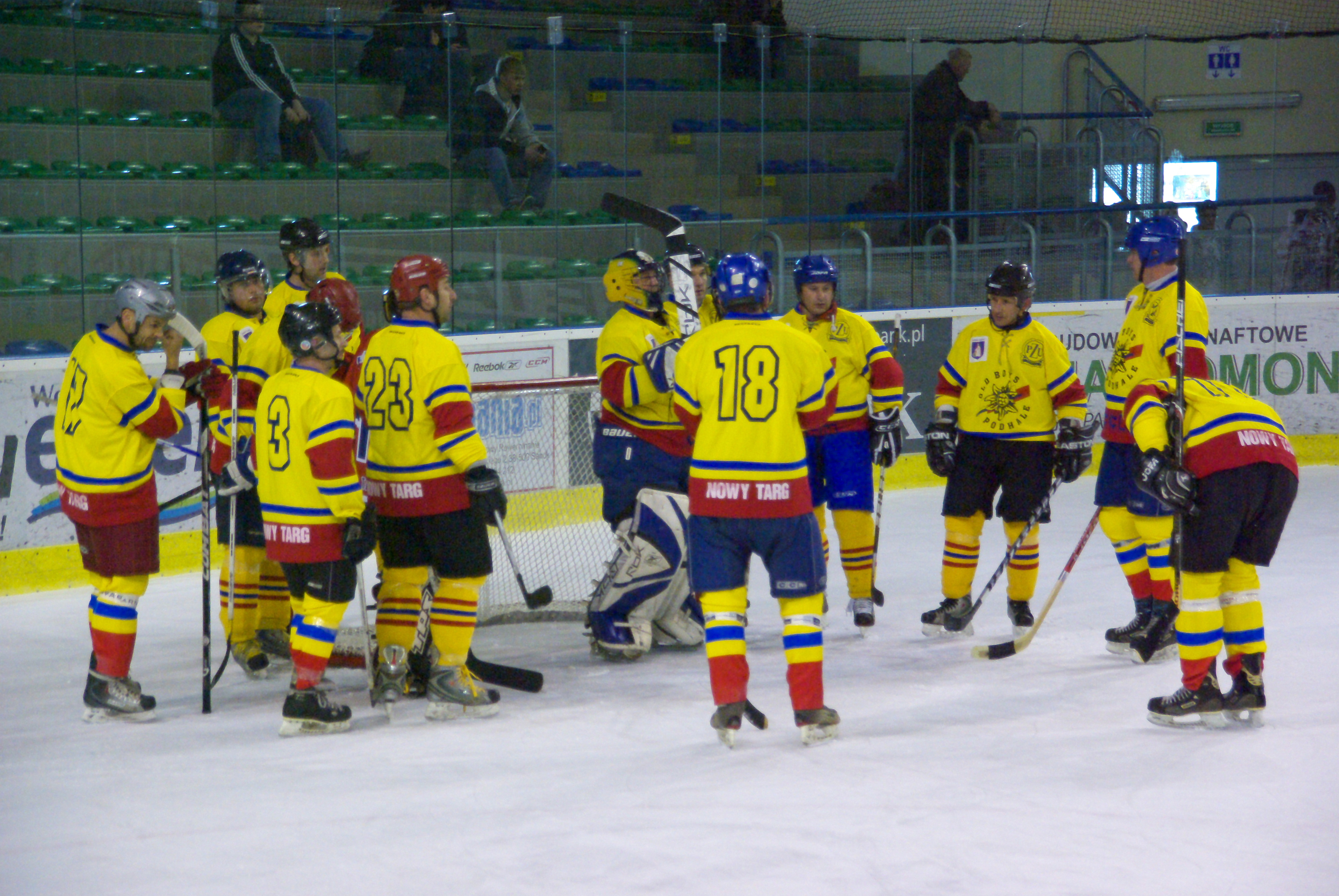 Drużyna Old Boys Podhale podczas Mistrzostw Polski Oldboyów w Sanoku 2012